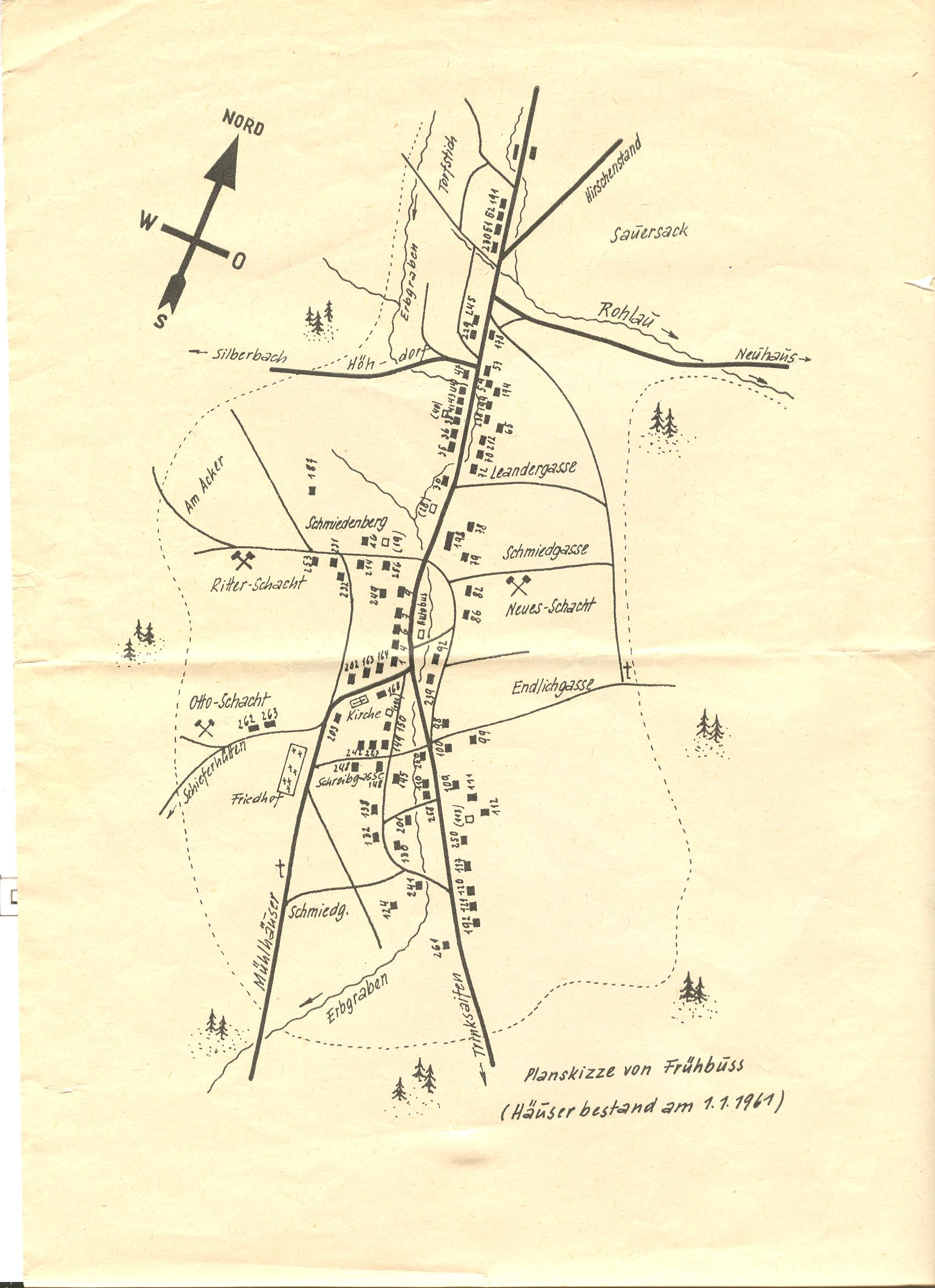 Přebuz, okres Sokolov. Situační plán zástavby k roku 1961 (pozůstalost po mém otci Hermannu Götzovi z Přebuze).